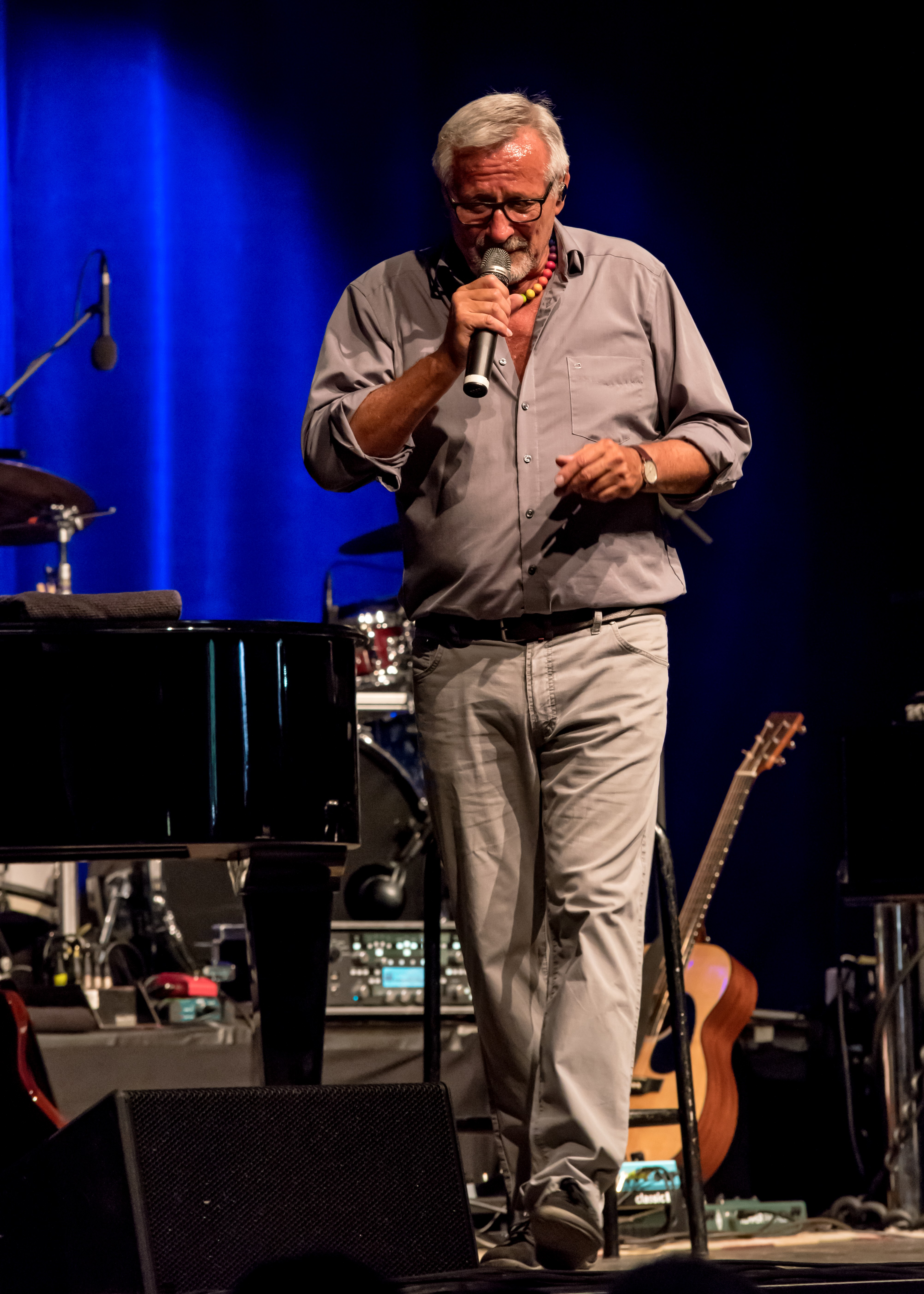 Bilder vom Zelt Musik Festival 2017 in Freiburg im Breisgau Konstantin Wecker (ZMF 2017) am 17.07.2017